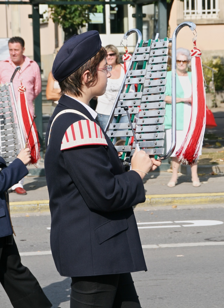 Klackespill-Lyra.